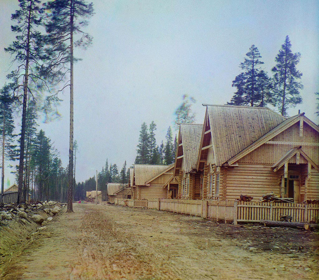 Ж.д. поселок у ст. [Масельская]. 1916 год